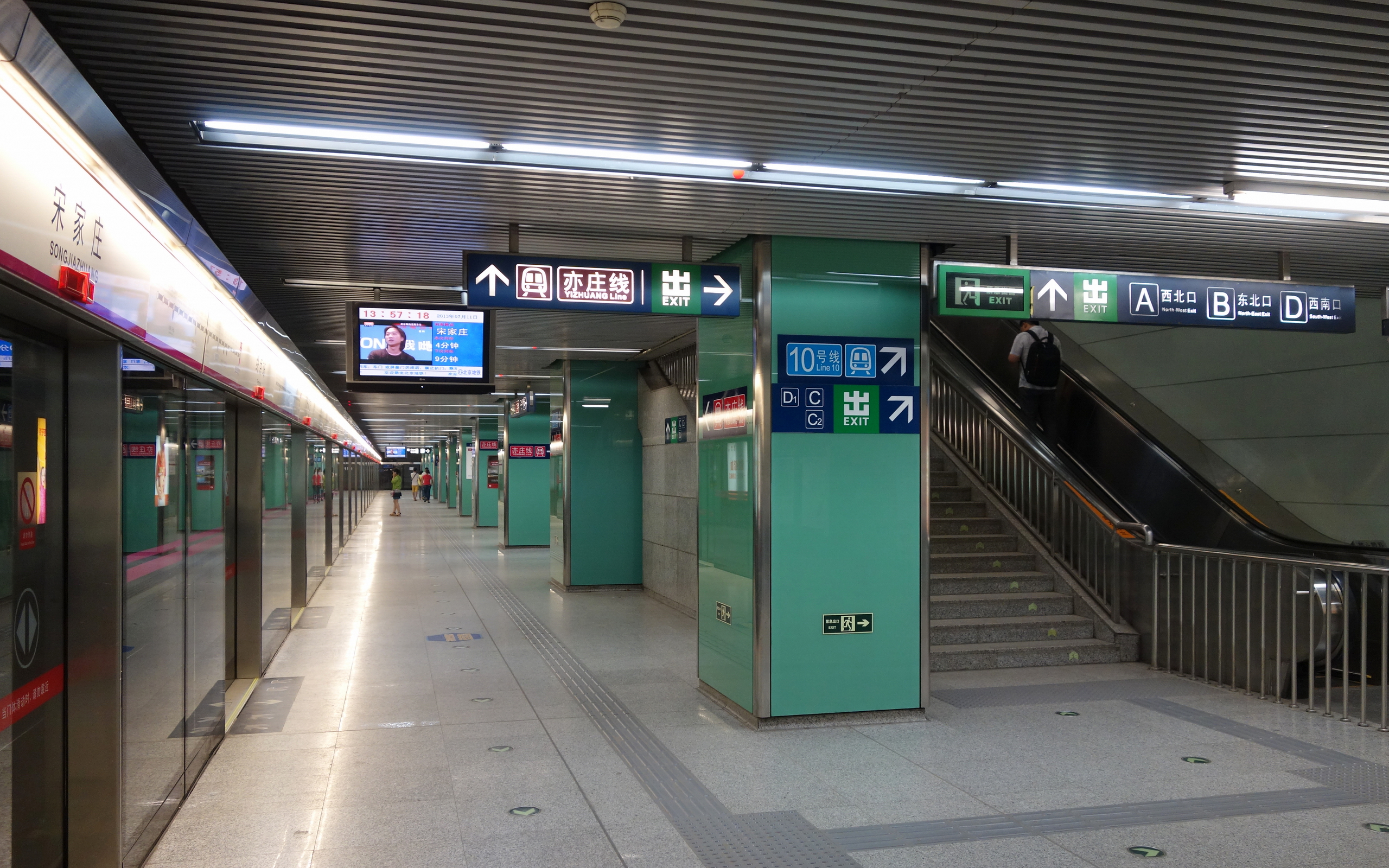 北京地铁5号线宋家庄站终点站台